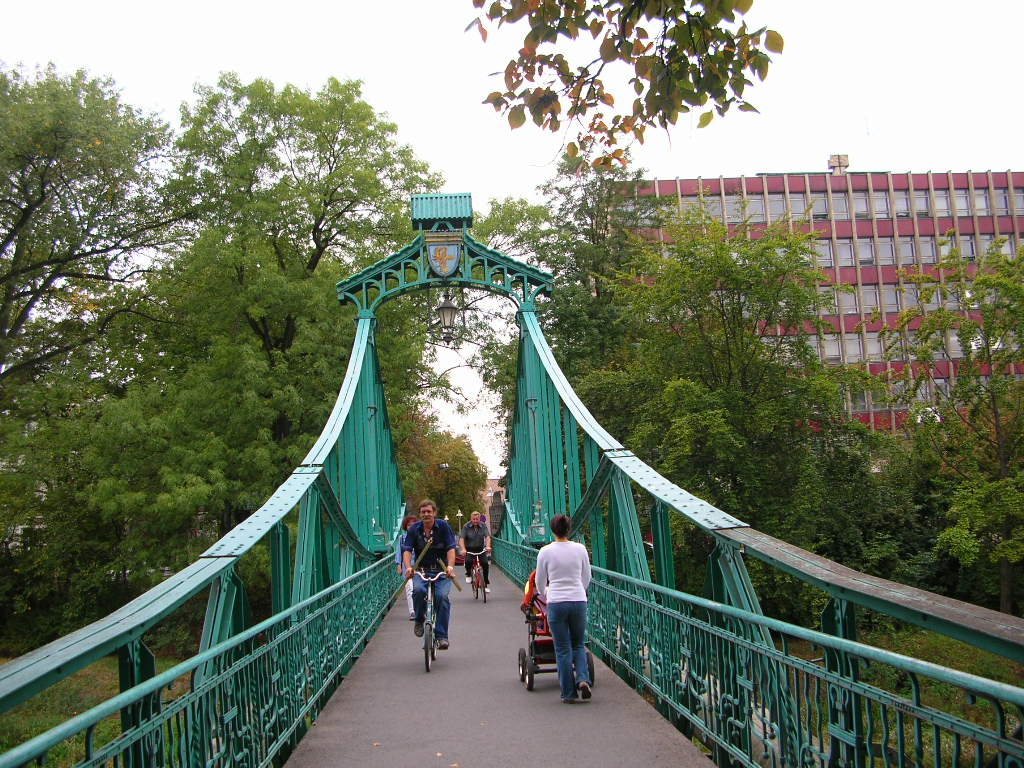 Opole - Most łączący ul.Wolfganga Amadeusza Mozarta z ul.Piastowską Autor - Bartek Wawraszko ( Bast )